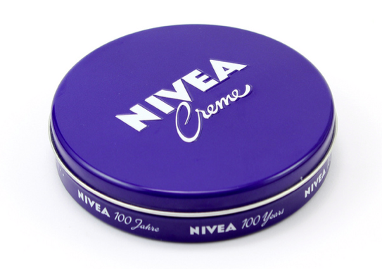 La boite bleue de Crème Nivea